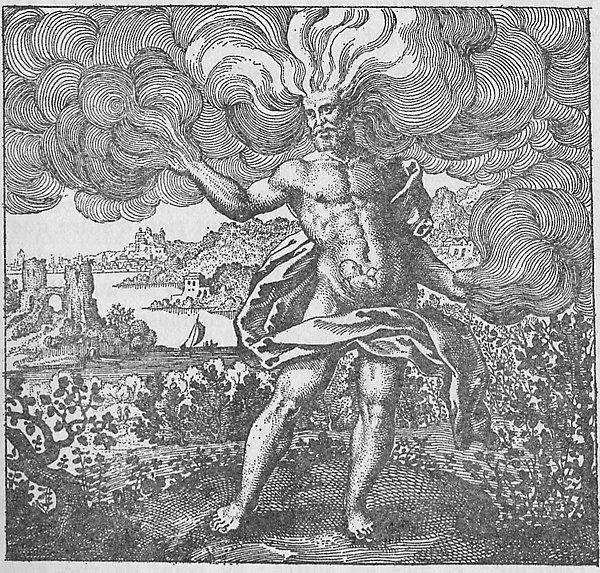 Emblème 1